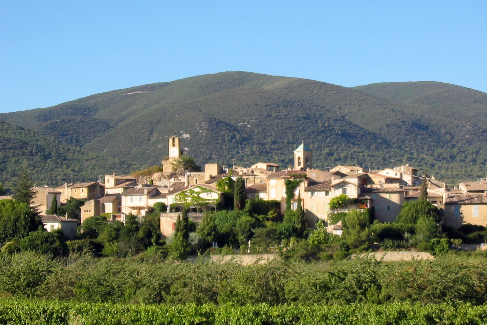 Eigen werk. Zicht op het dorp Lourmarin in de Vaucluse.